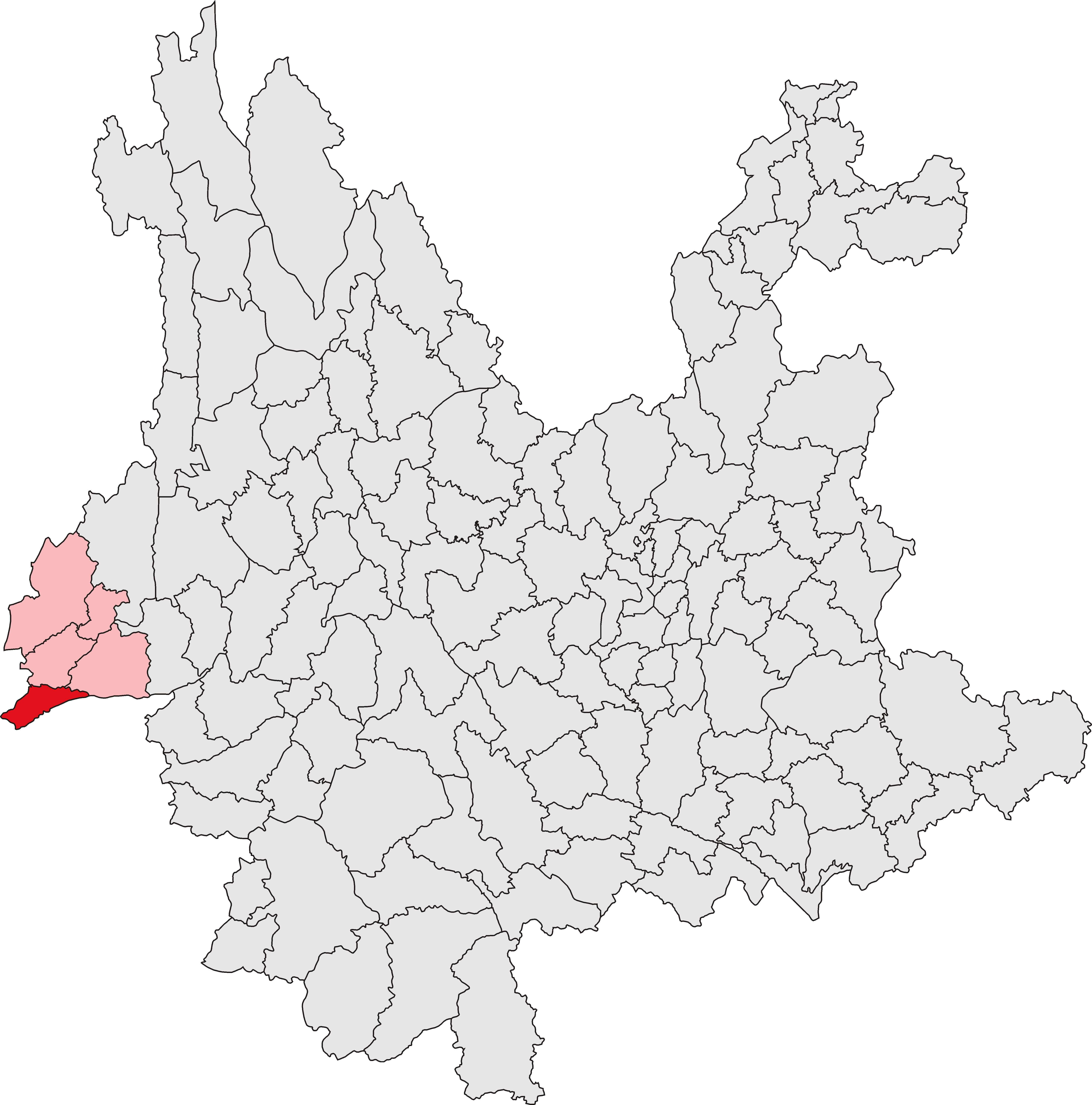 中文（中国大陆）: 瑞丽市位置图